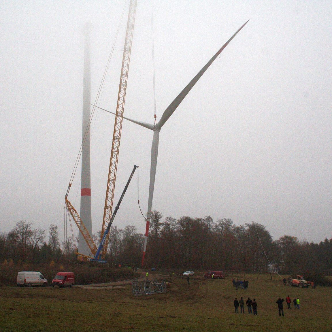 Anheben des Rotorsterns von Anlage 1. Der Rotor wird dabei sowohl von einem Hilfskran (links unten) als auch von einem Arbeiter (rechts unten) geführt